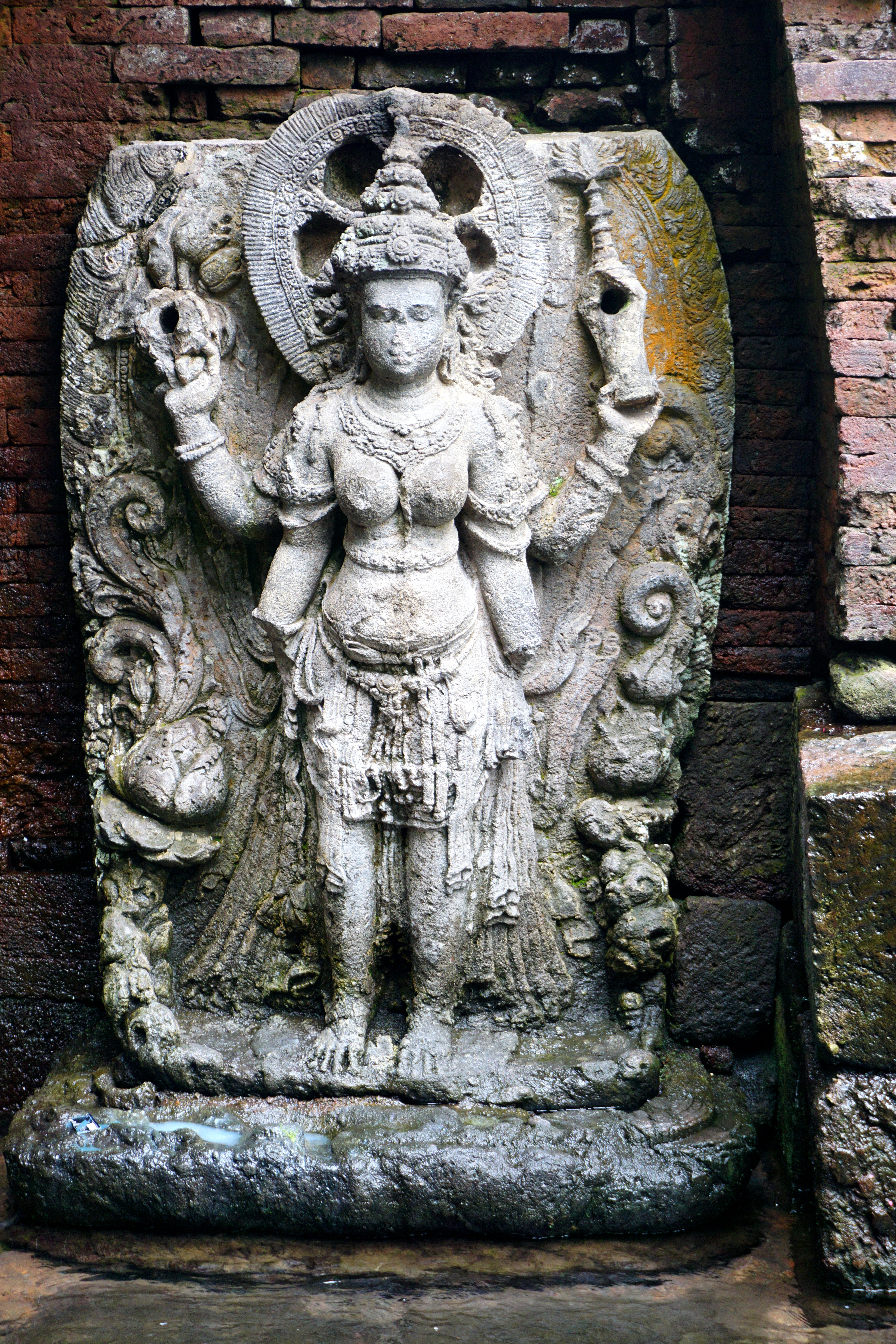 042 Goddess, Candi Belahan, Pasuruan Candis, East Java Pasuruan, East Java